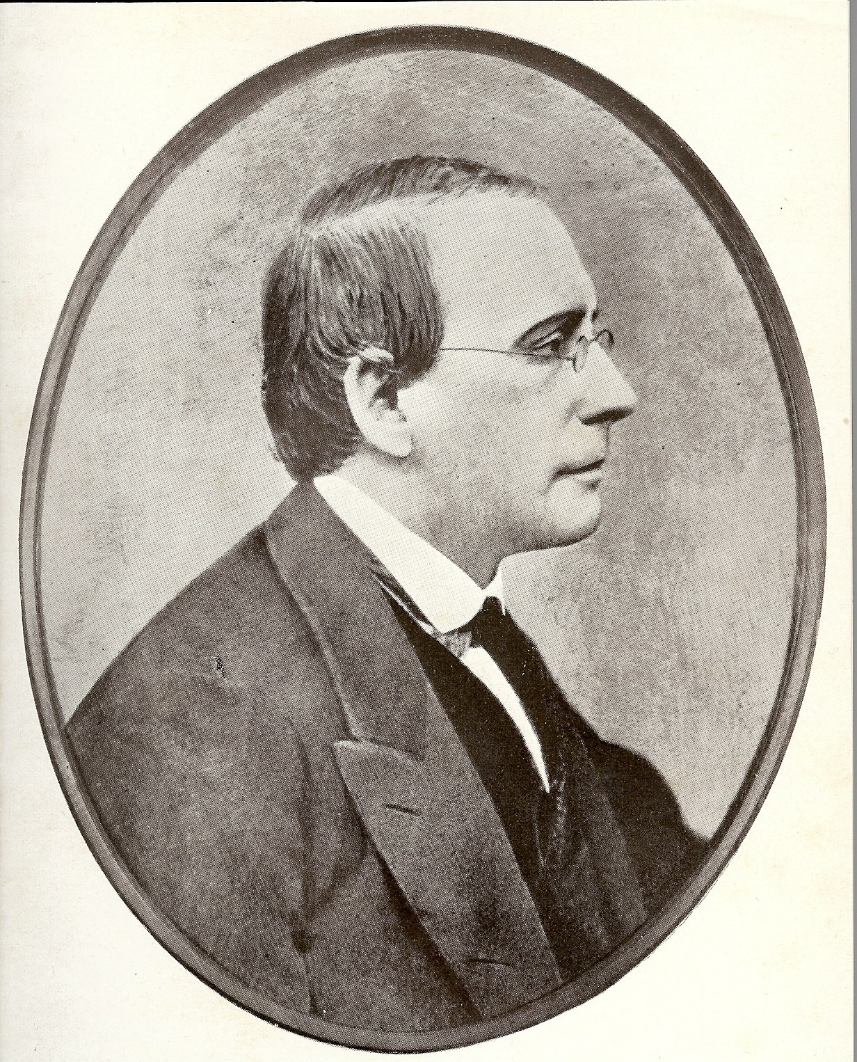 Giovanni Battista Bottero (1822-1897) Foto ca 1870 di autore sconosciuto. L'immagine si trova sul libro di Ermanno Amicucci intitolato: G.B. Bottero giornalista del risorgimento, stampato a Torino nel 1935-XIII dalla società Editrice Torinese di Torino Via Valdocco, 2